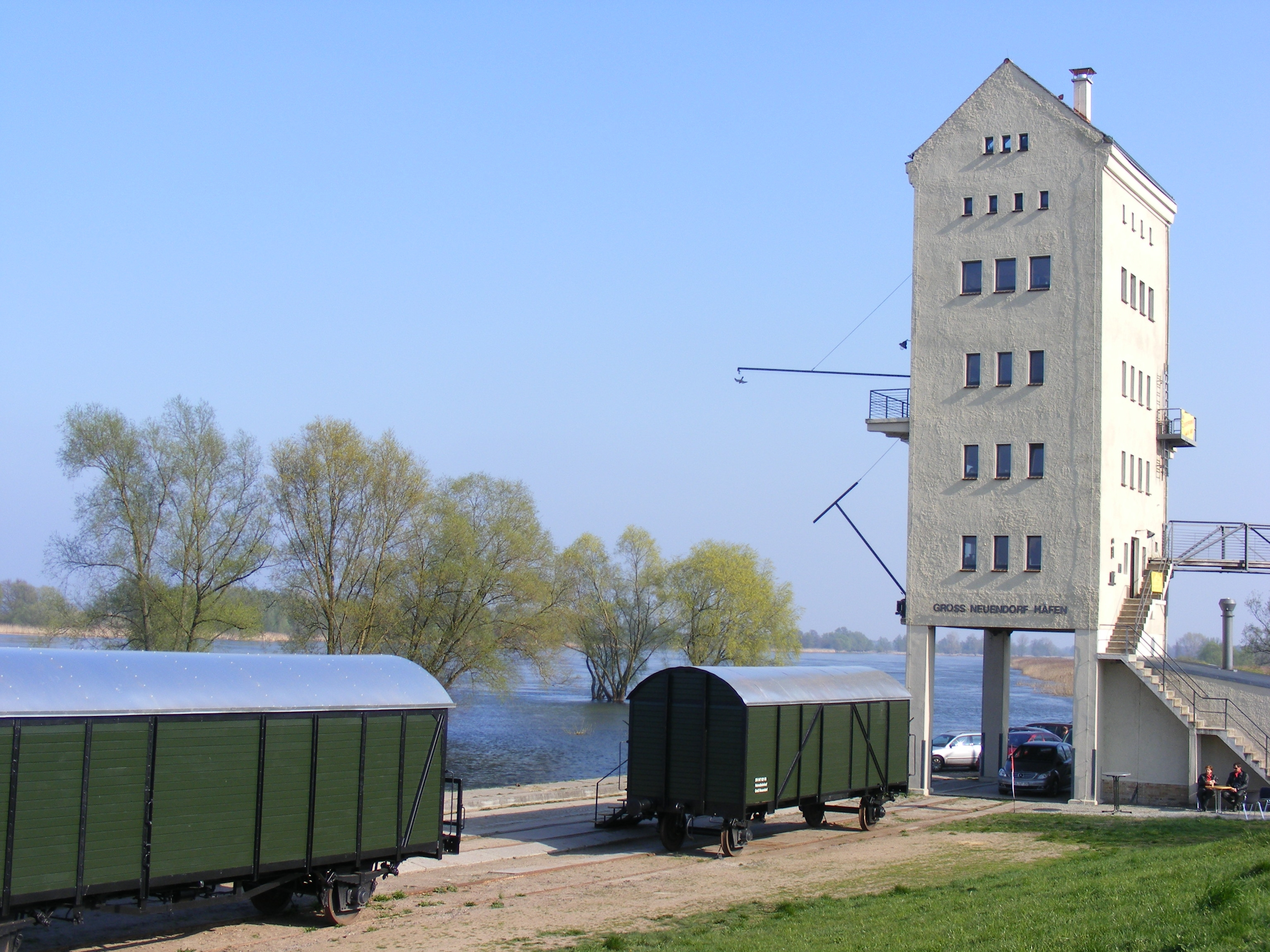 Speicher im Hafen Groß Neuendorf